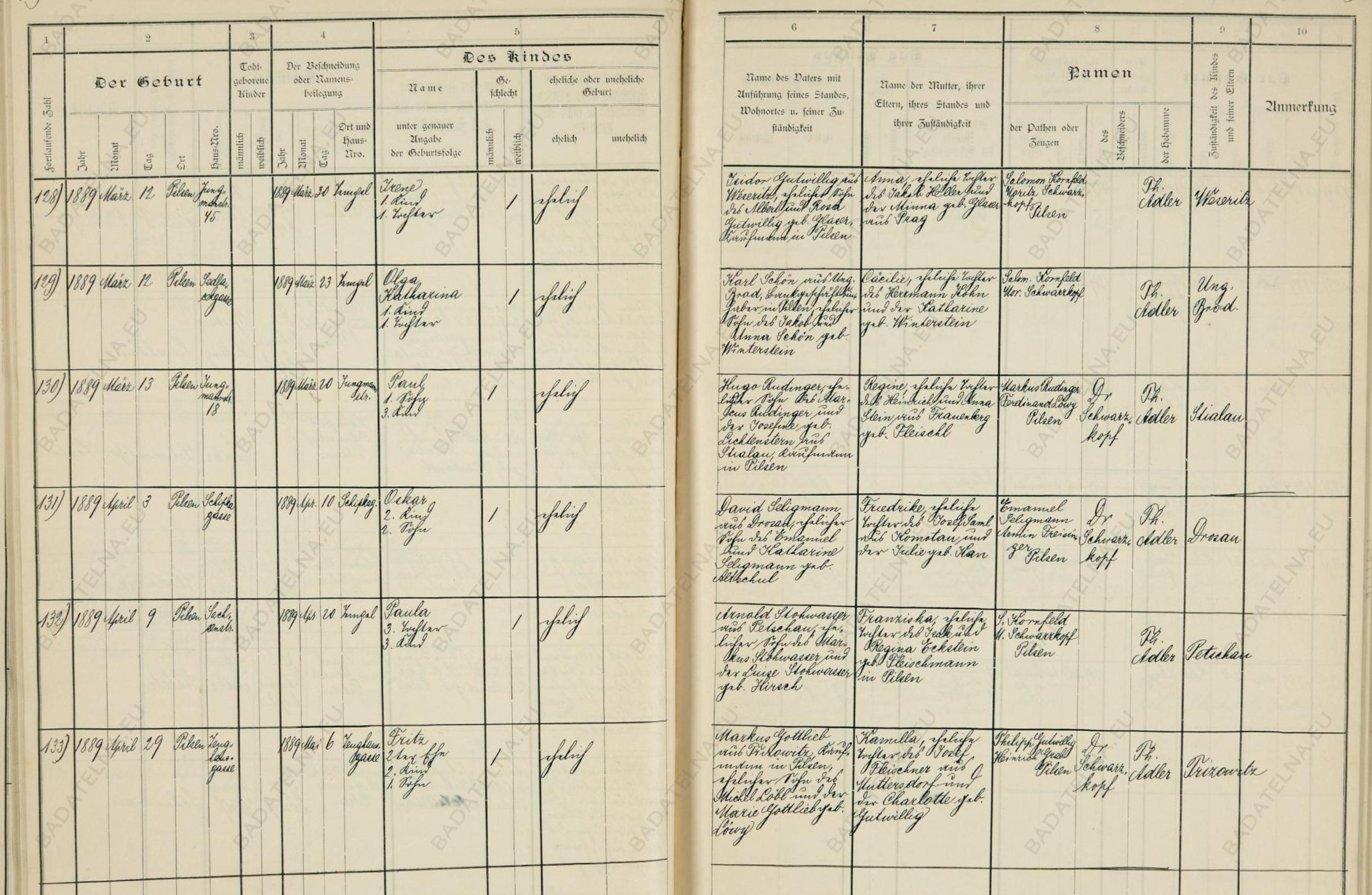 Stránka 43 z židovské matriční knihy č. 154. Synagoga Plzeň